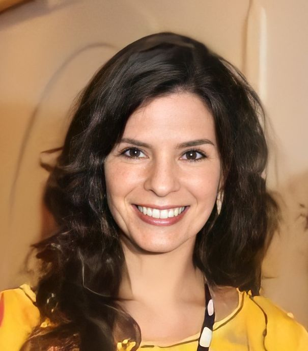 Flávia Monteiro e Helena Ranaldi (ao centro) foram acompanhadas de amigas assistir aos desfiles do 2º dia no Rio de Janeiro.